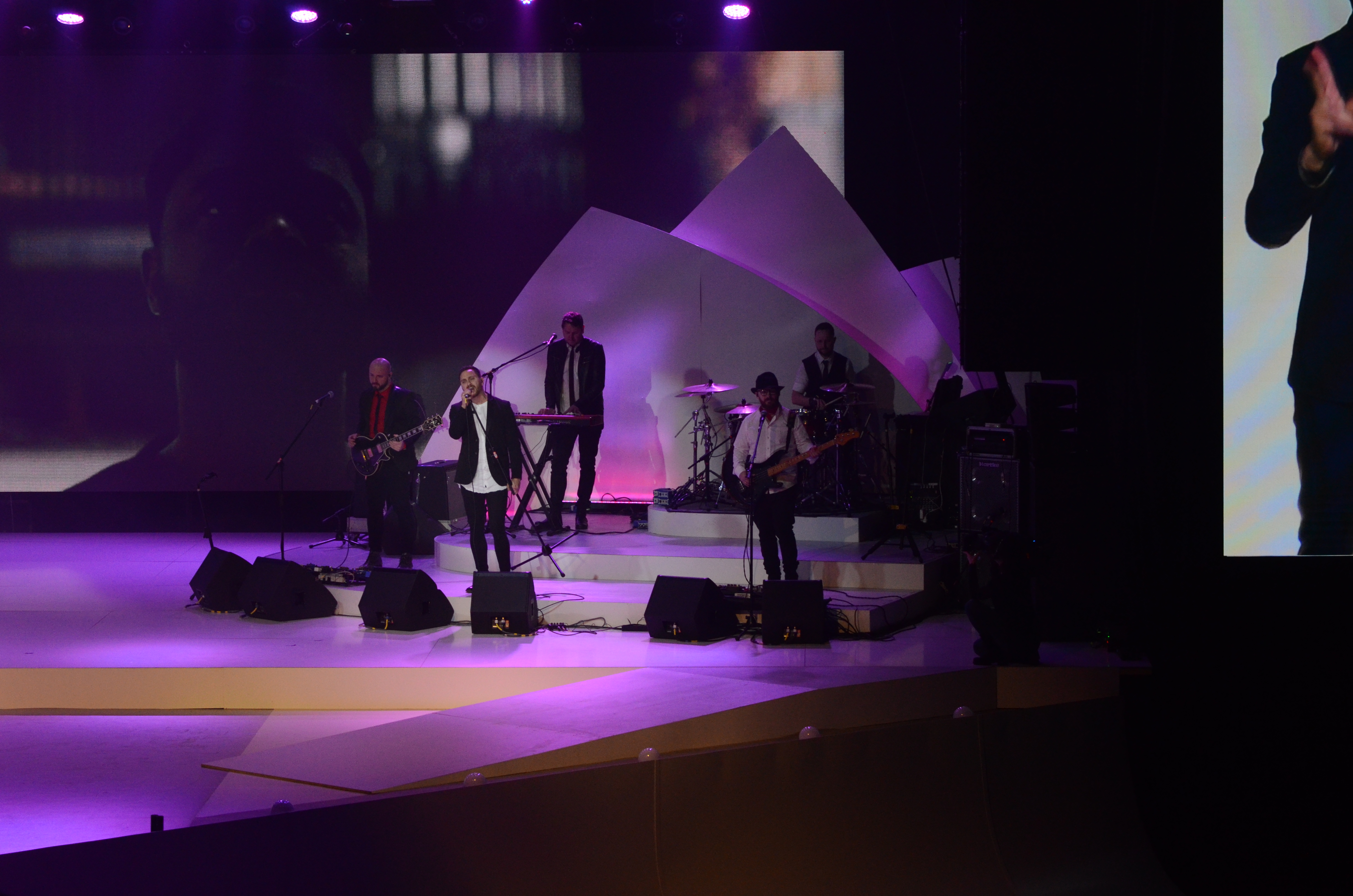 Урочиста церемонія проводів національної паралімпійської збірної команди України на XII зимові Паралімпійські ігри. Виступ гурту Друга Ріка.